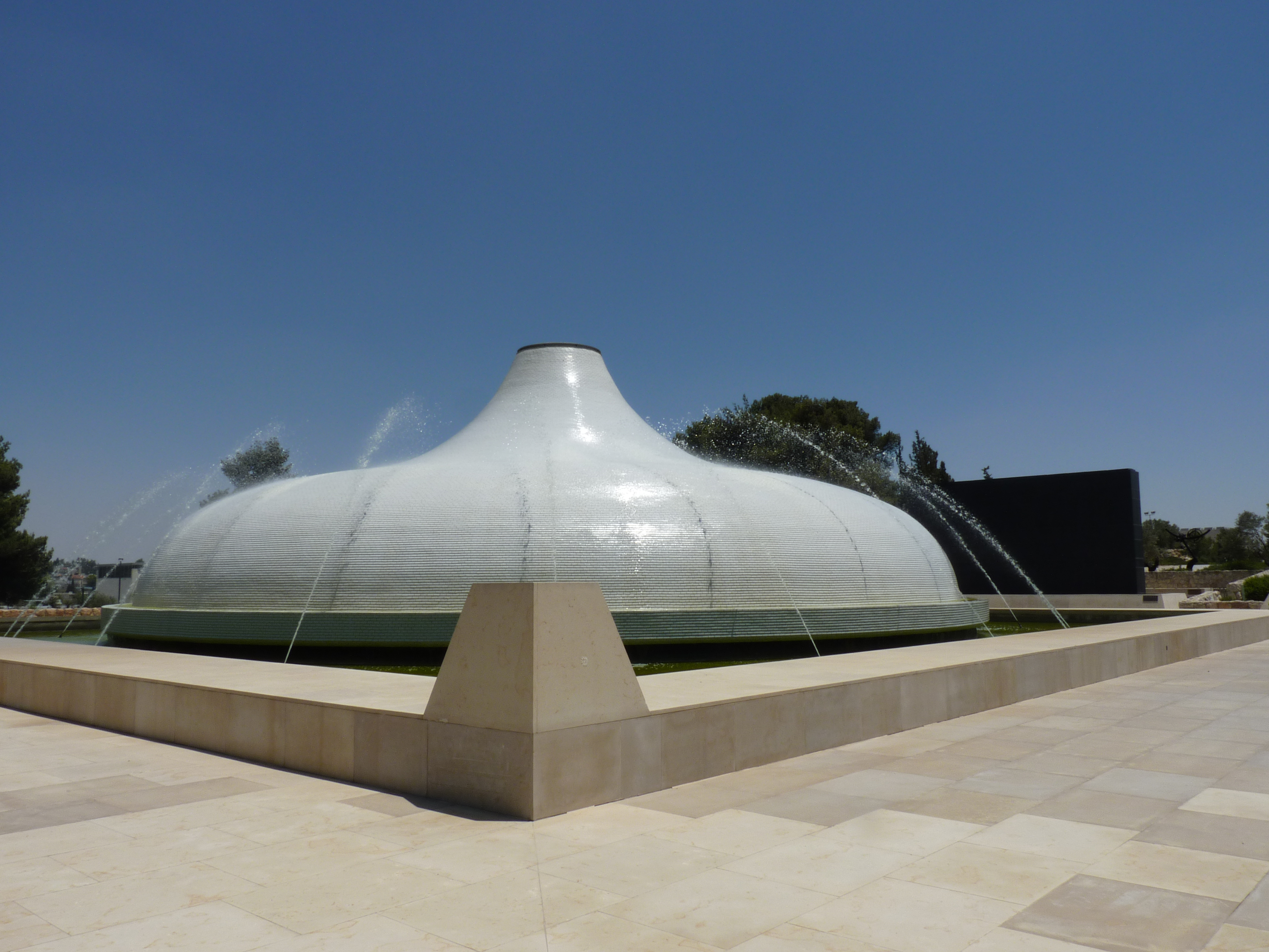 P1110194 Israel Museum, Jerusalem